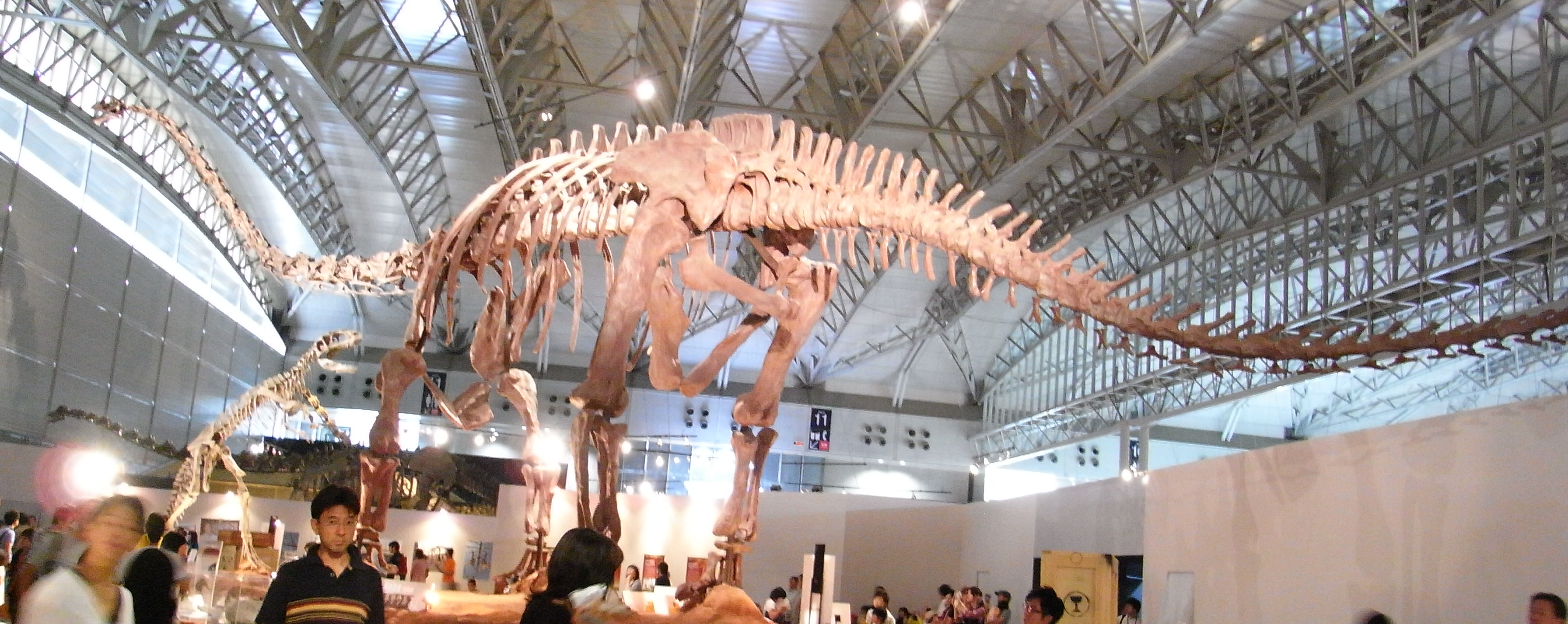 もはやマメンキでもマメンチでも構わない大きさ。